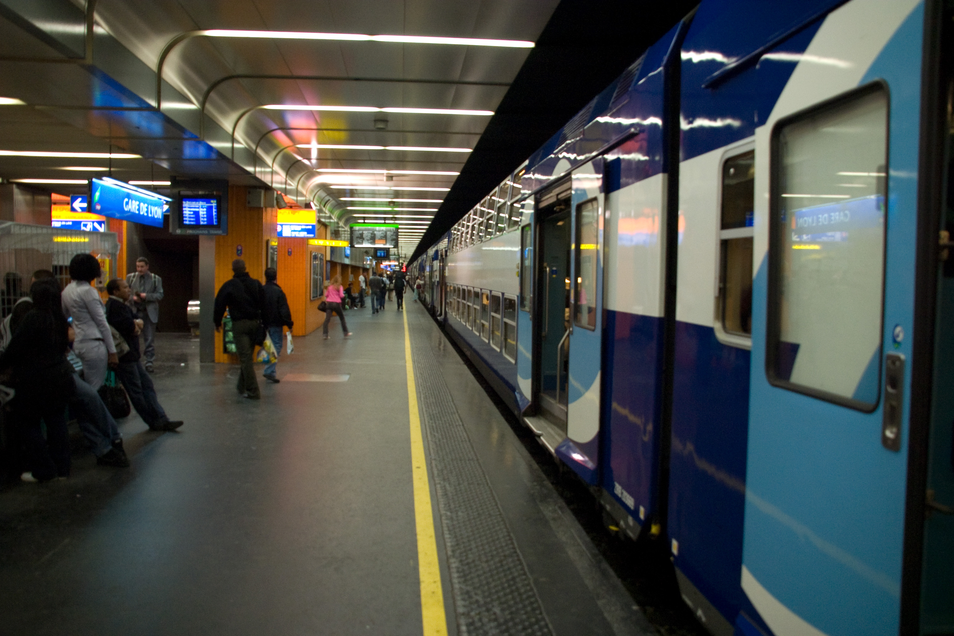 Gare de Lyon, Paris, France